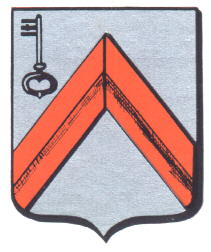 Wapen Dudzele